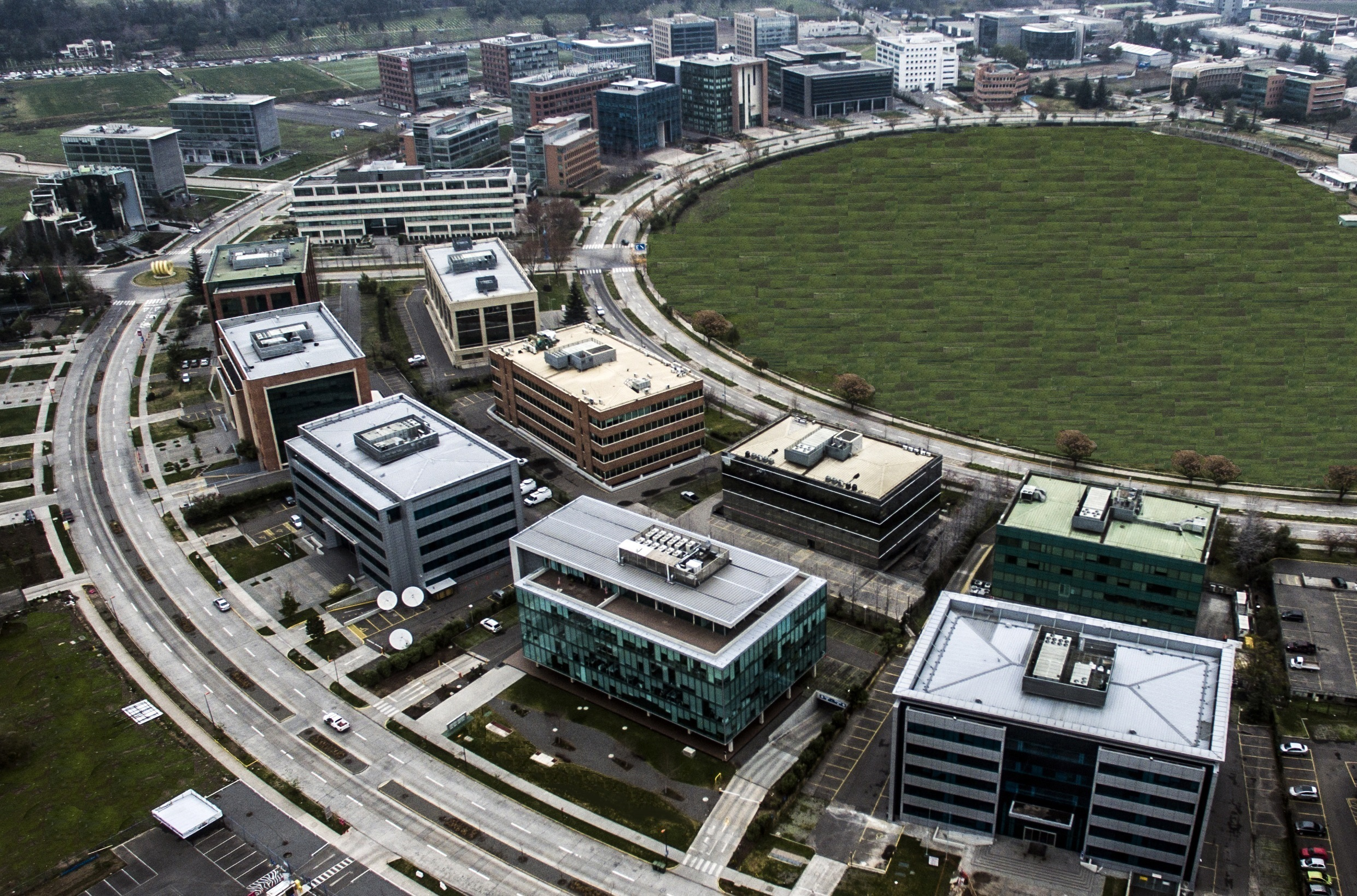 Avenida del Valle desde el aire, ubicada en Ciudad Empresarial, Huechuraba, Santiago de Chile.